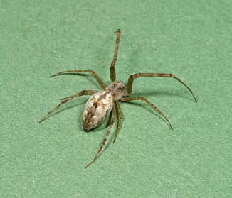 female Octonoba tanakai from Okinawa.